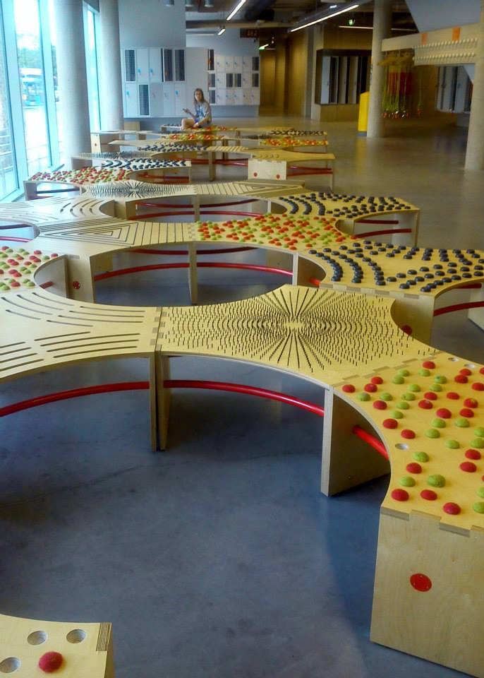 Hol w Science Centre AHHAA w Tartu, Estonia